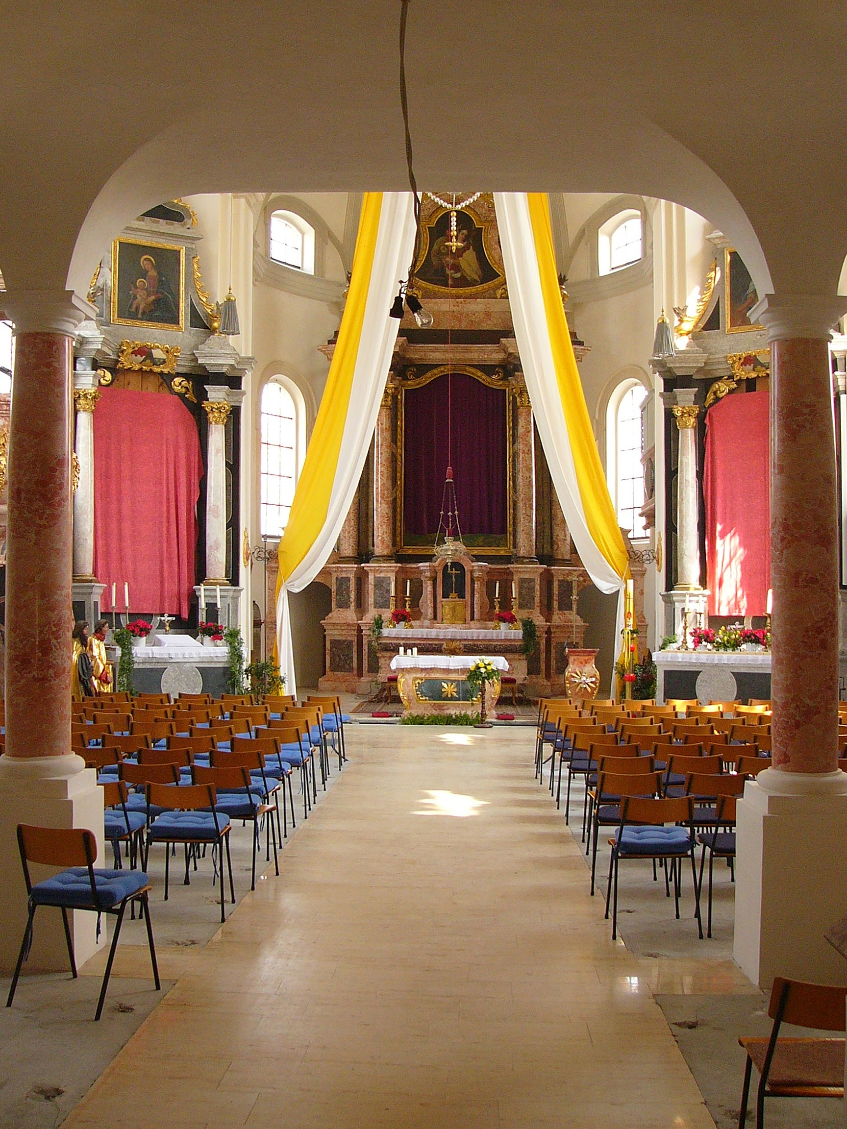 Kath. Pfarrkirche St. Johann Baptist; Saalkirche, barocke Anlage von 1710/11, Gliederung durch Lisenen und umlaufenden Sockel, Westturm mit Zwiebelhaube; mit Ausstattung; Friedhofsmauer, 18./19. Jahrhundert; Grabkapelle der Grafen Preysing, in basilikaler Form, mit Lisenengliederung und Rundbogenfries, neuromanisch, 1891; mit Ausstattung. This is a photograph of an architectural monument.